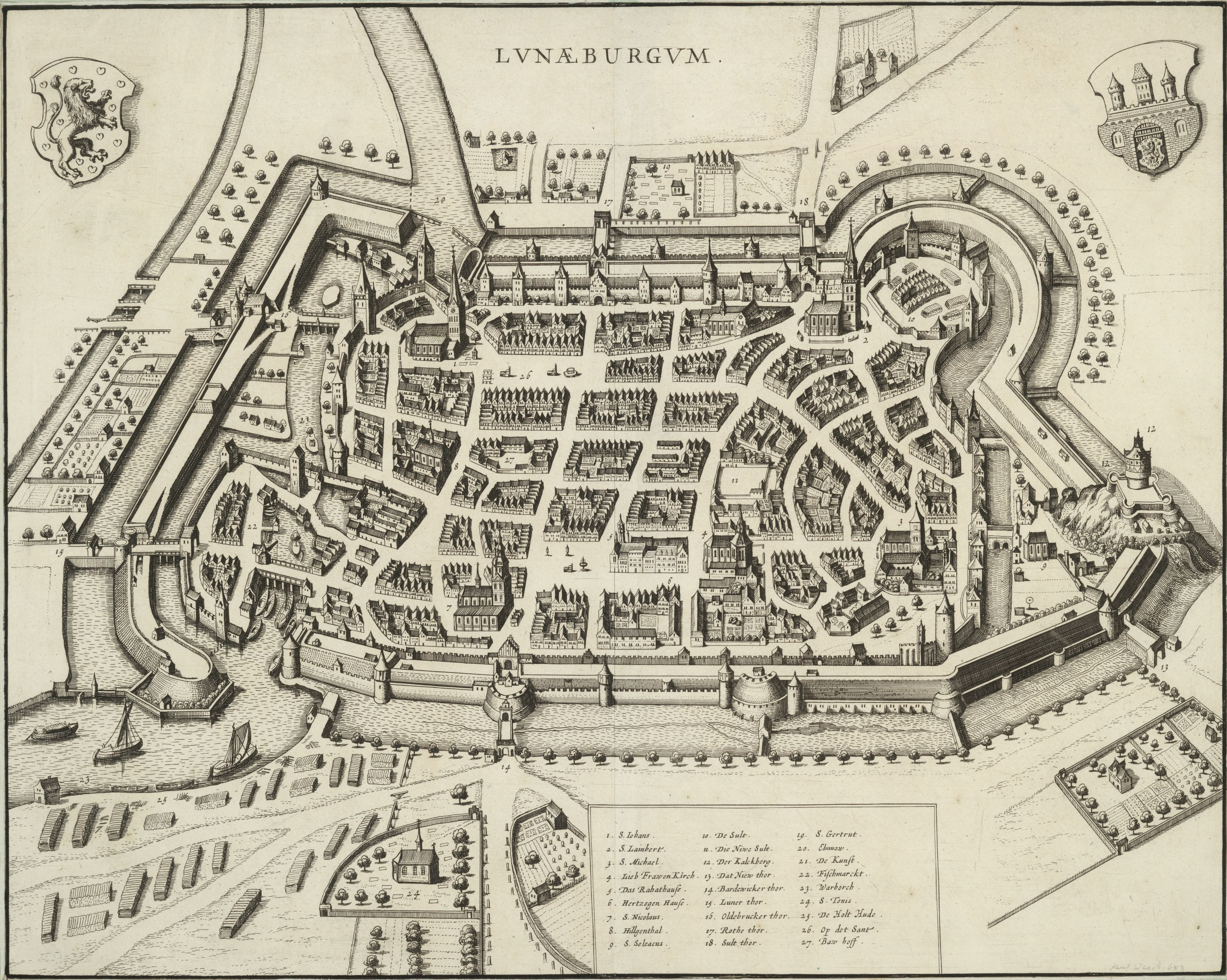 Vogelschauplan von Lüneburg, 1:3500, Radierung, um 1682. [Lunaeburgum] Lvnaeburgvm. - [Ca. 1:3 500]. - [Amsterdam], [um 1682]. - 1 Vogelschauplan : Radierung u. Kupferst. ; 50 x 39 cm Titel oben Mitte. - Ohne Kt.-Netz. - Mit Gebäudeverz. - Mit 2 Wappen